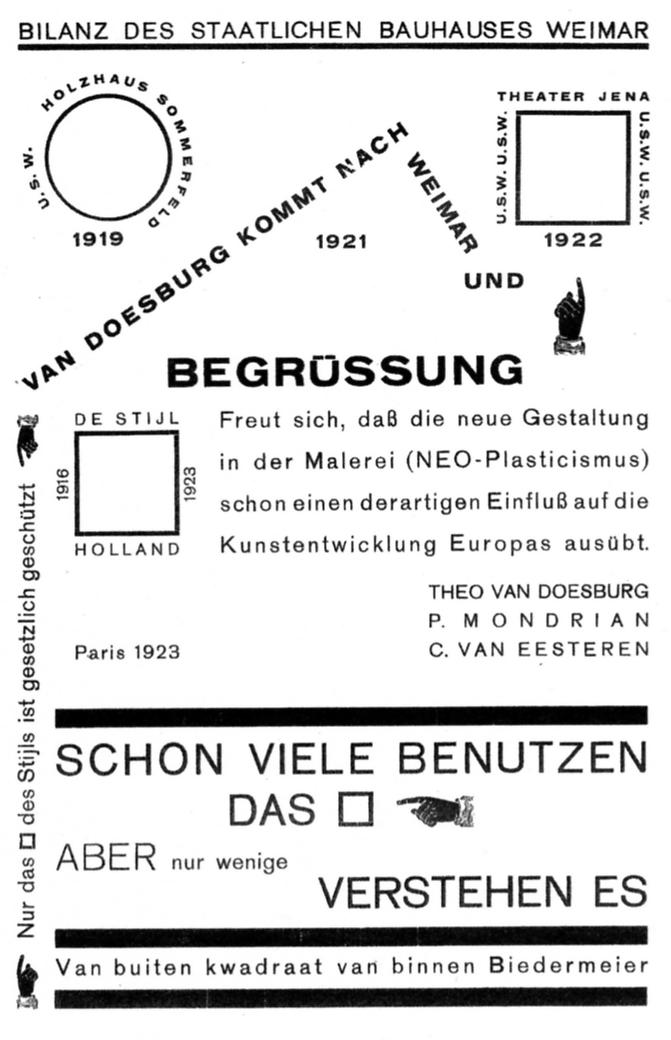 Theo van Doesburg, 'Bilanz des Staatlichen Bauhauses Weimar', Mécano, No 4/5 White, Blanc, Wit, Weiß (1923): back.